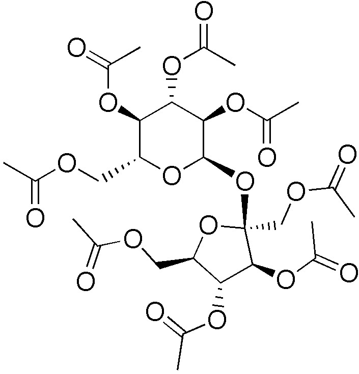 chemical structure of sucrose octaacetate